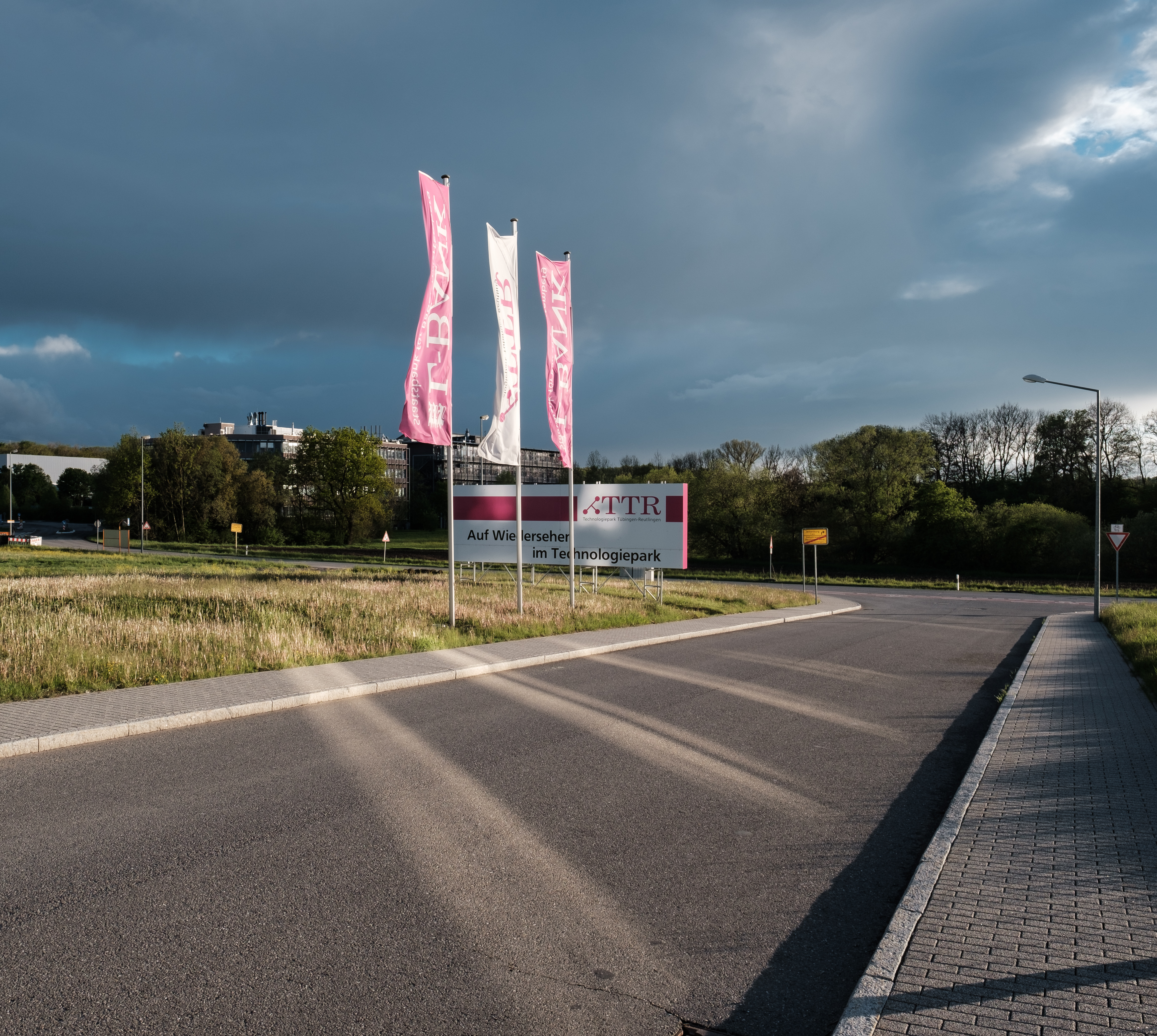 Fahnen im TTR